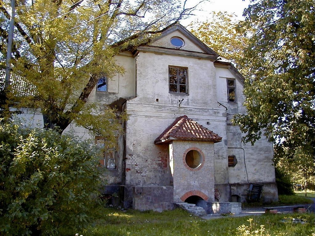 Ances muižas pils 2000-09-17